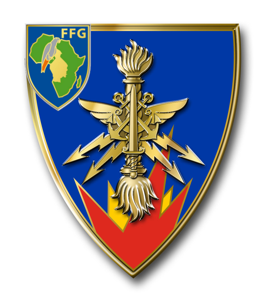 Insigne GMu du Gabon